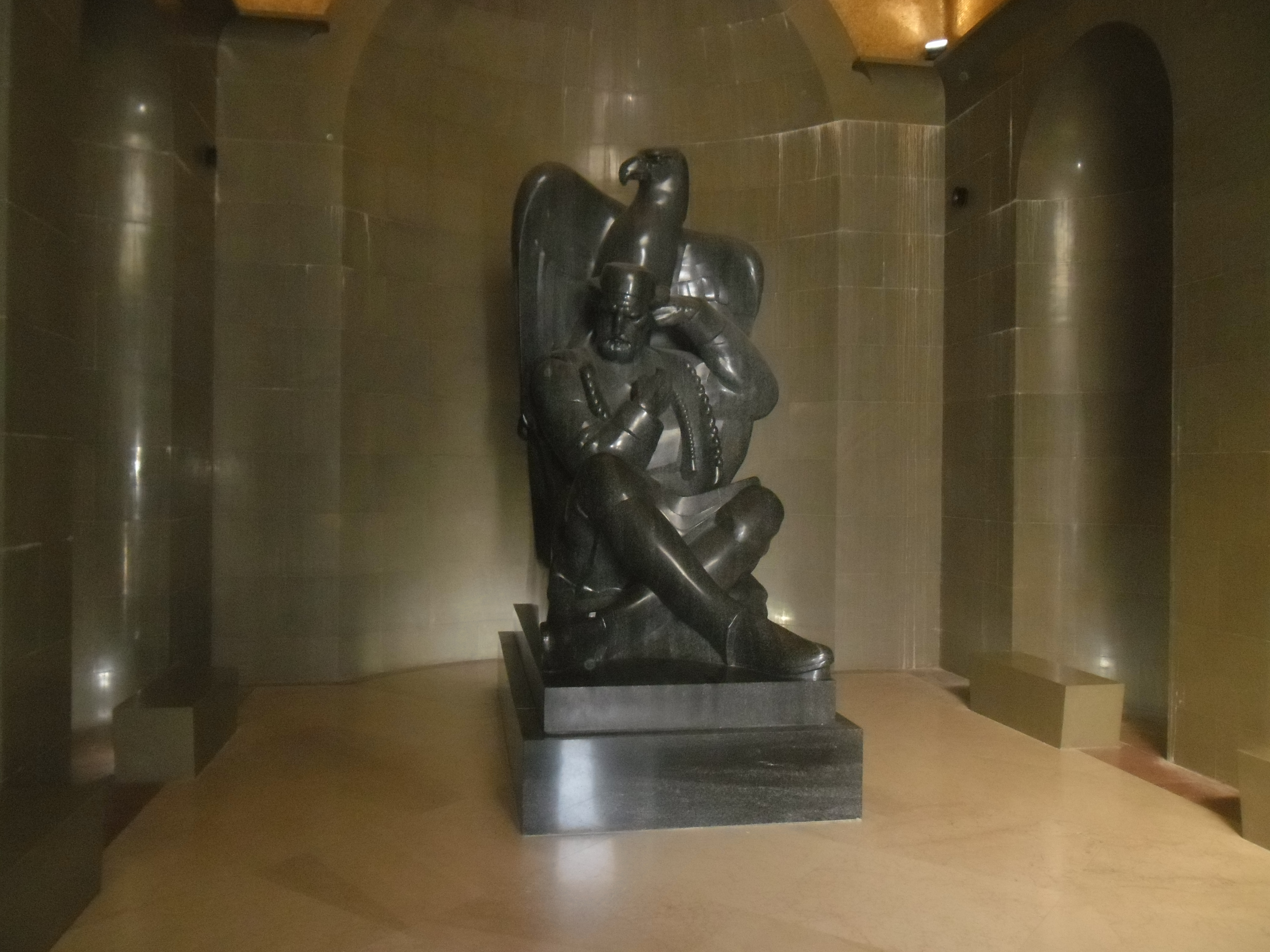 Lovćen